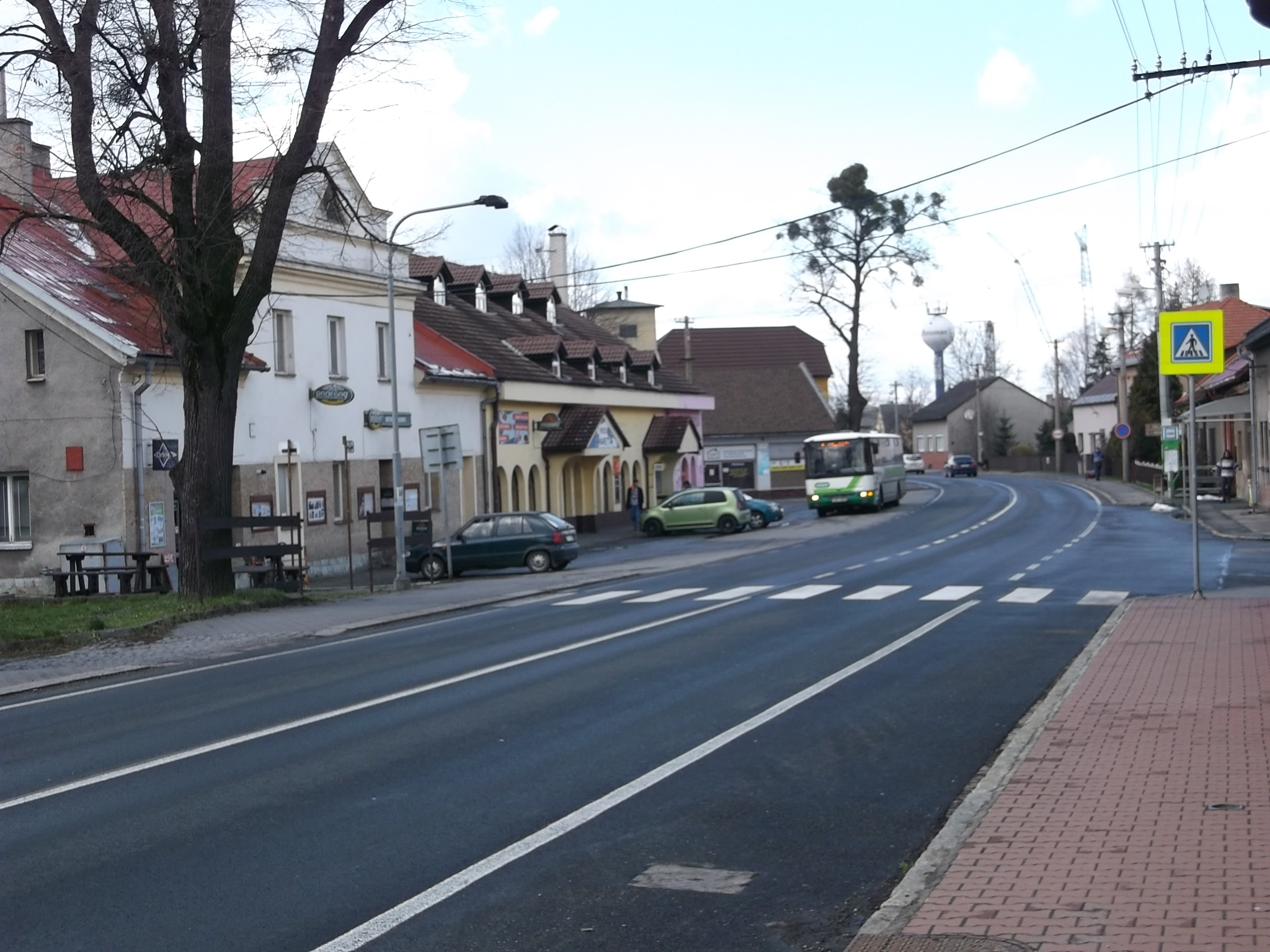 Náves